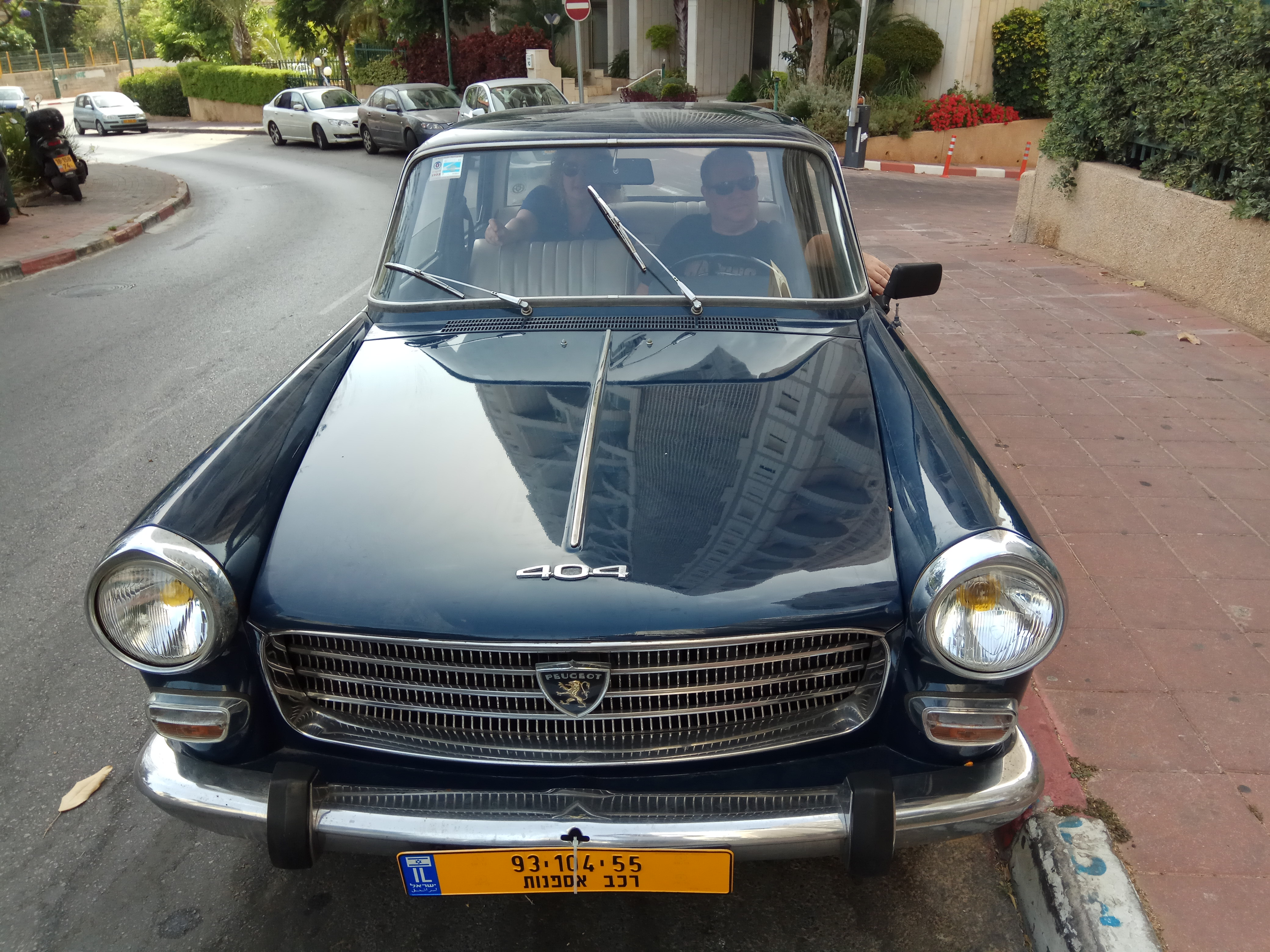 רכב אספנות פיג'ו 404 מודל 1967